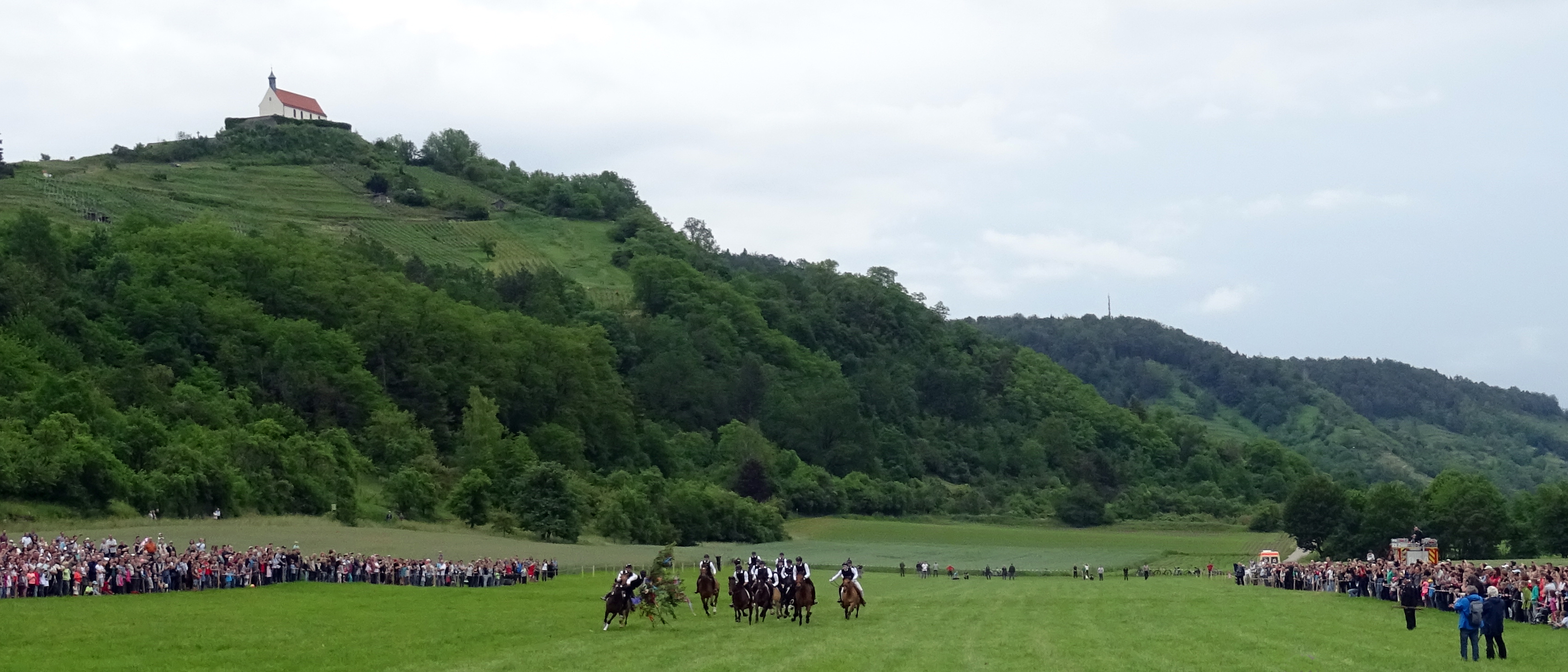 Wurmlinger Pfingstritt 2019, Sieger David Wolf beim Ergreifen des Maien. Rottenburg-Wurmlingen, Reitplatz unterhalb der Wurmlinger Kapelle